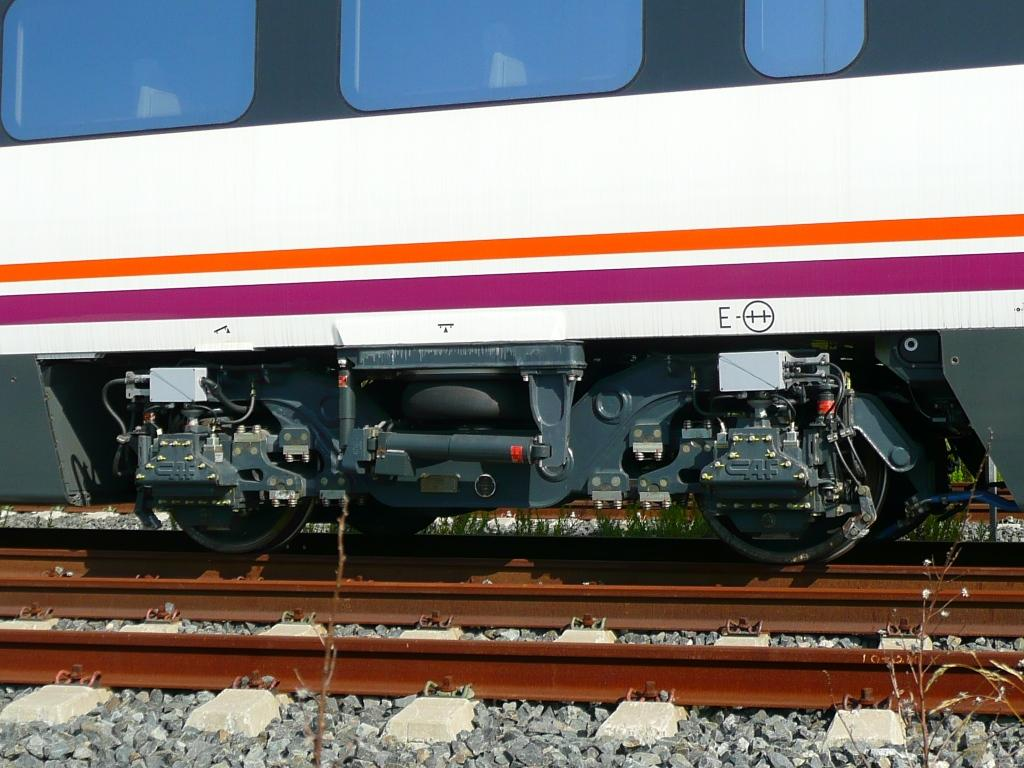 Boggie CAF de ancho variable de la Serie 121 de Renfe a pocos metros del cambiador de ancho de Roda de Barà.